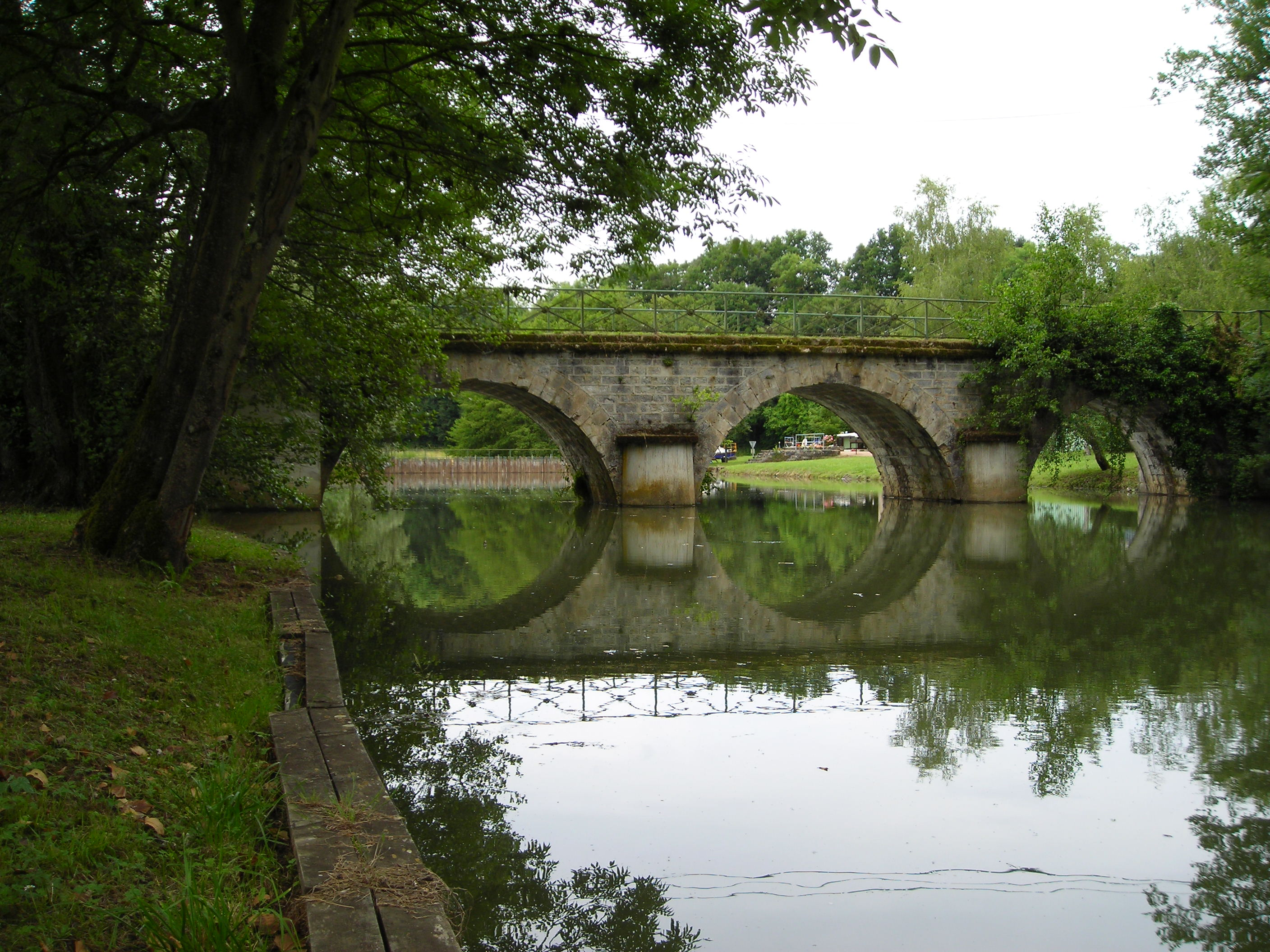 Rivière Aron sur le site de Fleury-Commune de Biches